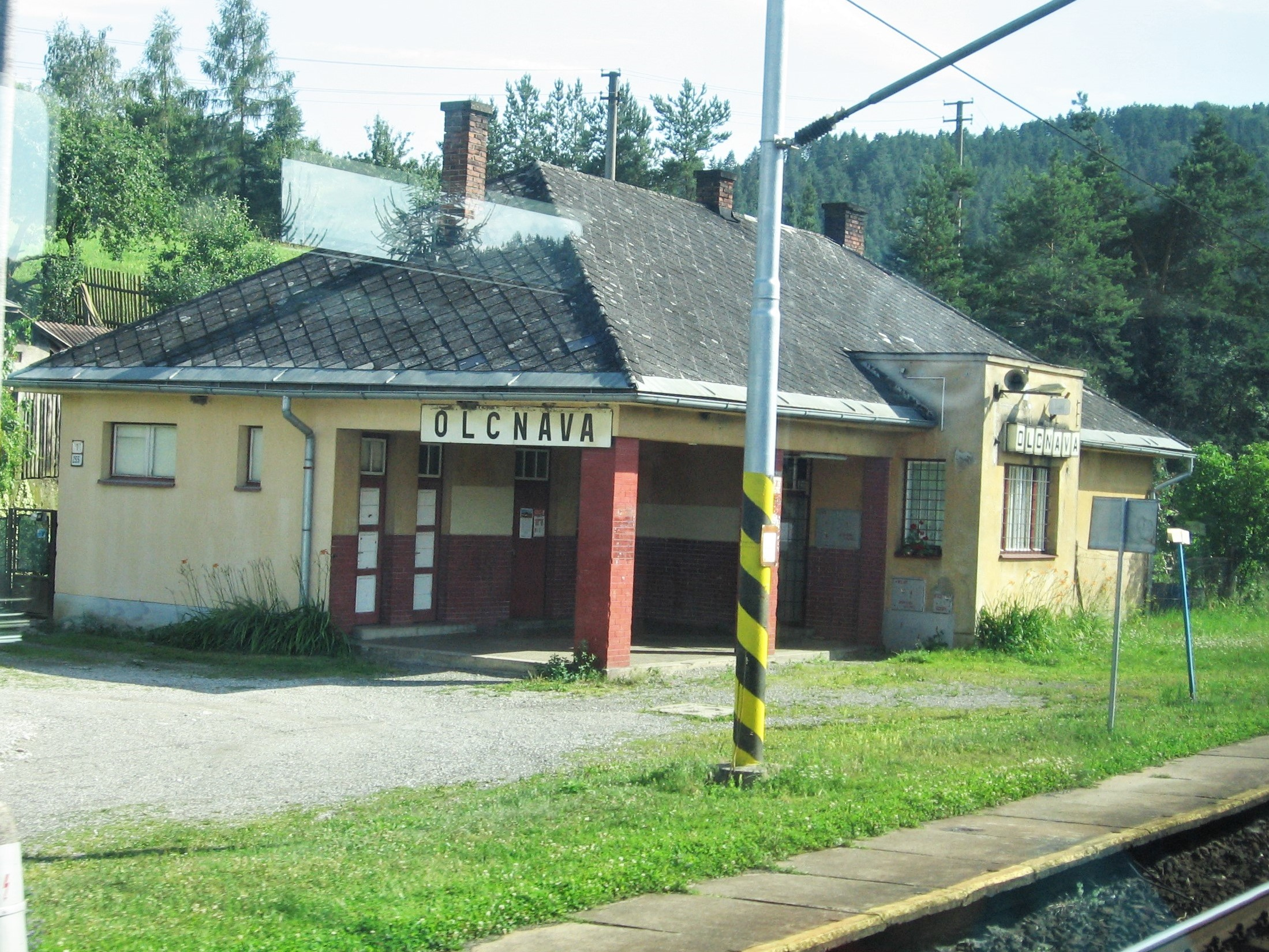 Zastávka Olcnava